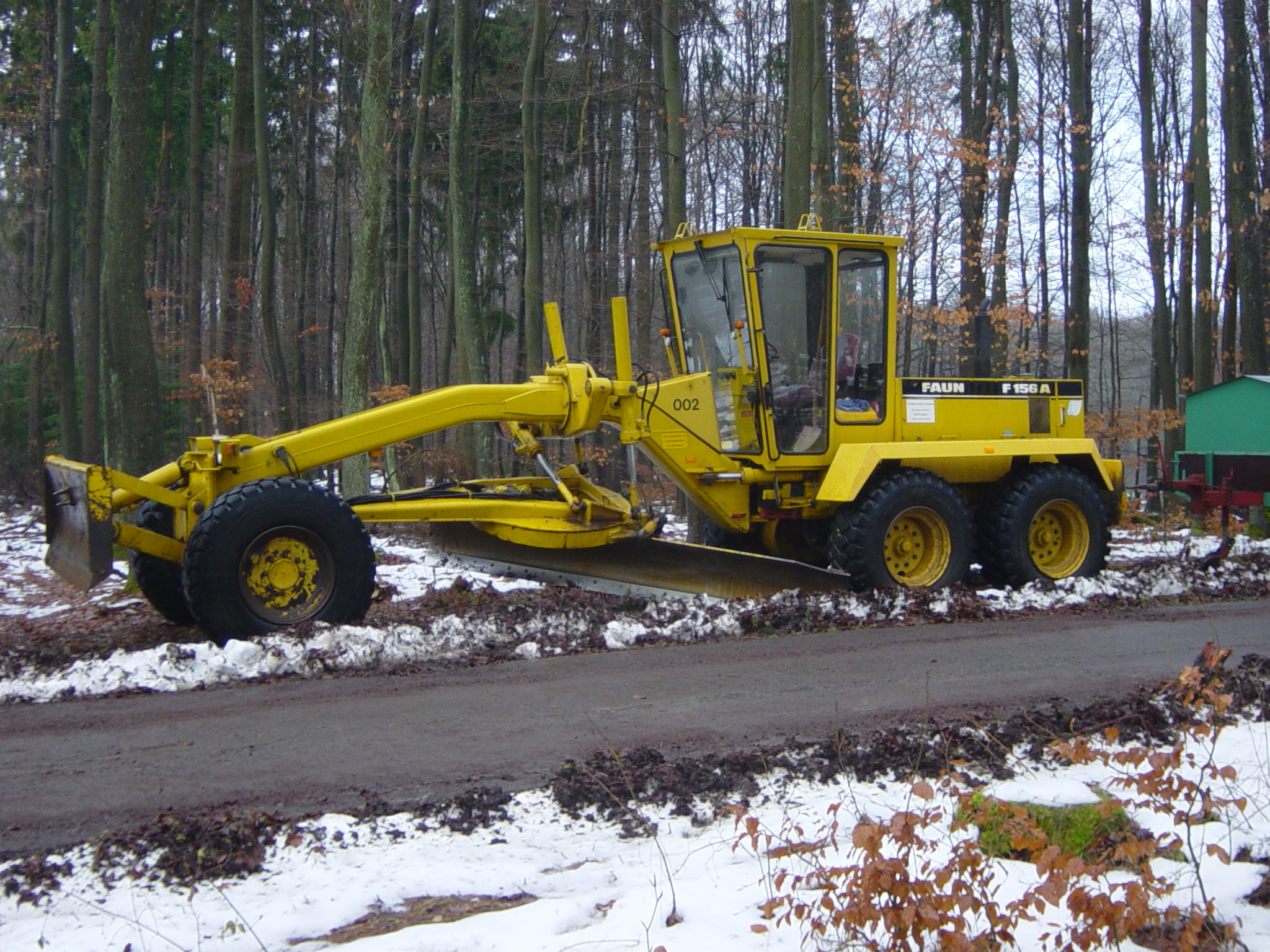 geparkter Grader, Faun F 156 A, der Hessen Forst Technik, Bebra, ca 5km östlich von Herborn. Im Vordergrund geebneter Forstweg.